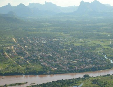 Foto da cidade de Jacinto - MG.